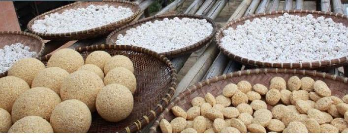 Borondong, makanan tradisional Sunda, Indonesia